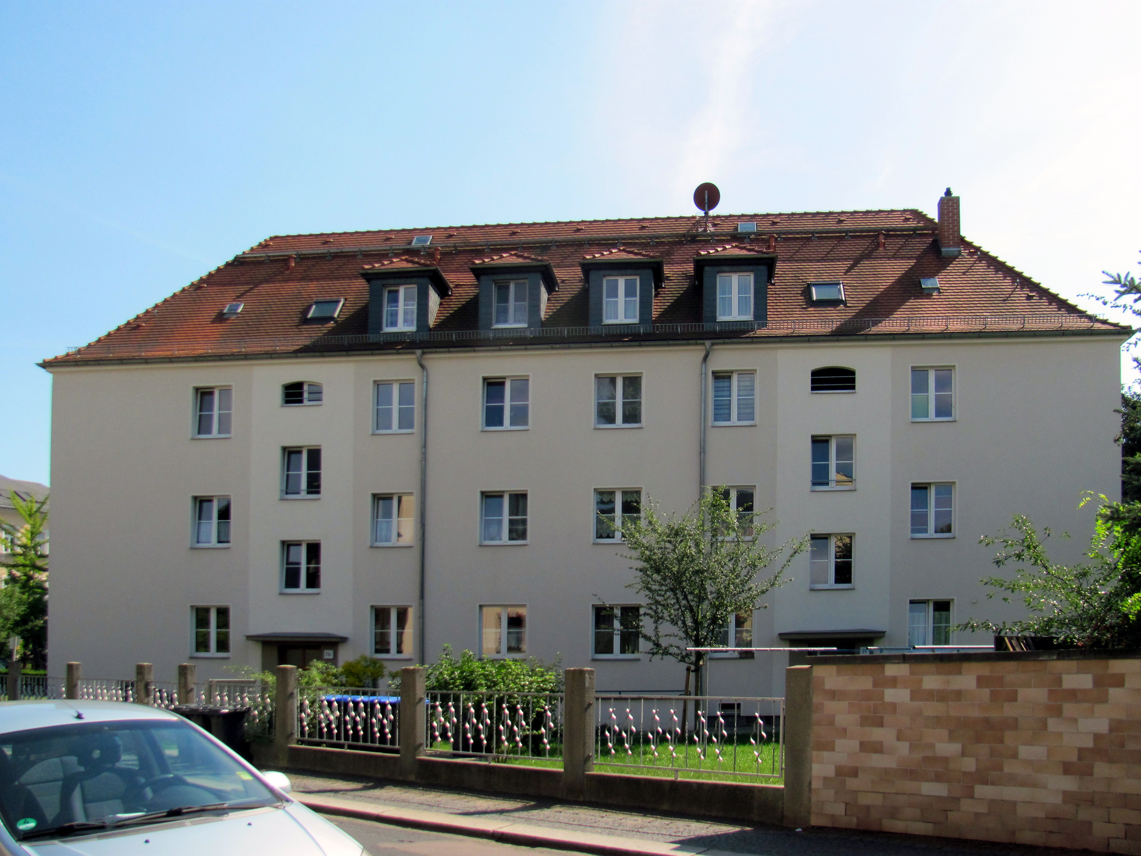 Radebeul (Gemarkung), Doppelwohnhaus Wichernstraße 21/21a (Radebeul)